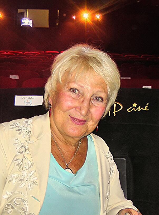 Présidente du 'festival Voix d'Etoiles 2016' de Leucate